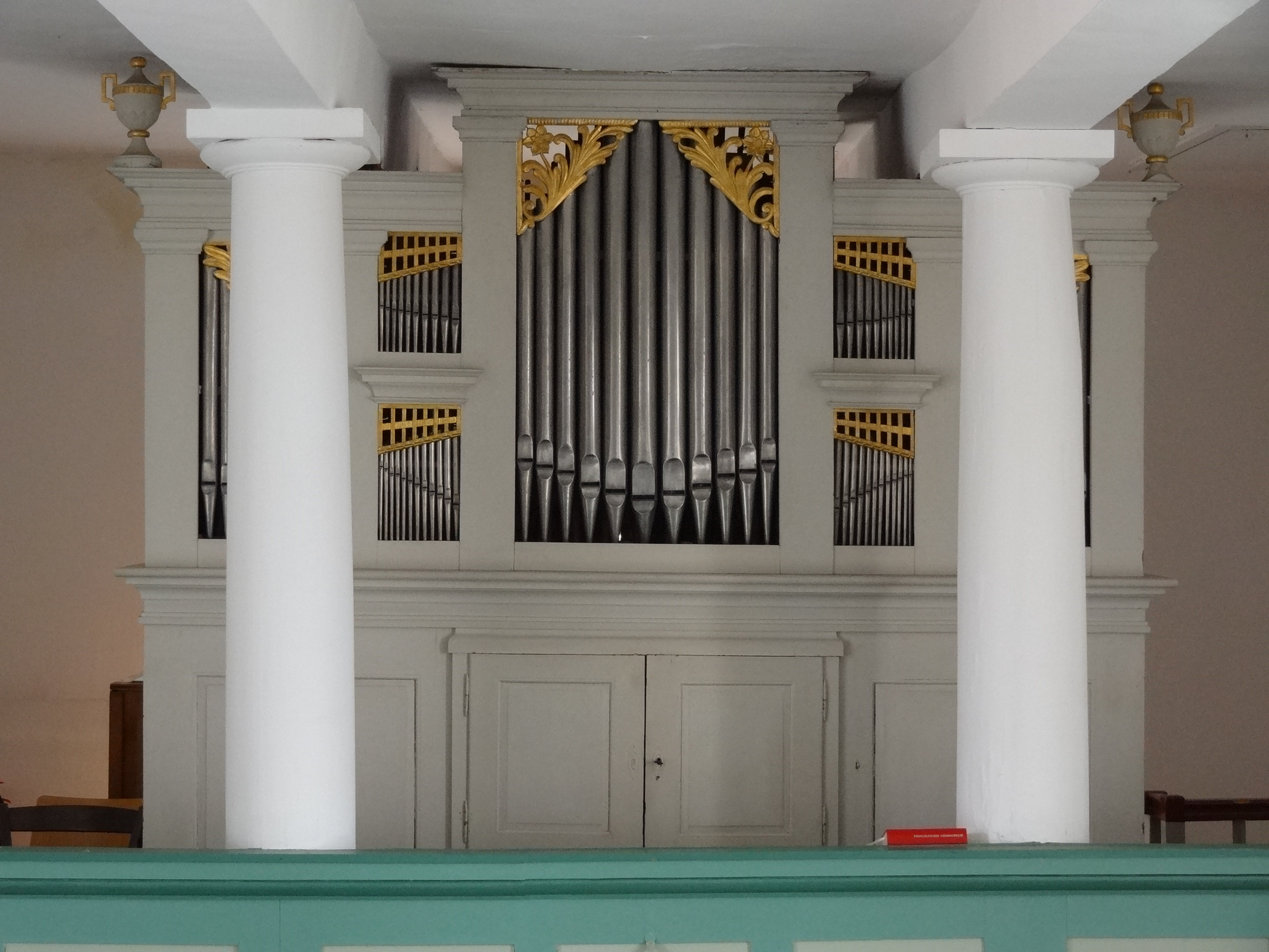 Evangelische Kirche Stornfels